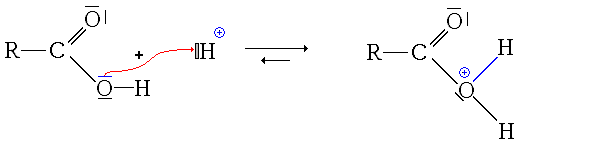 Protonation du groupe hydroxyle d'un acide carboxylique. J'en suis l'auteur.